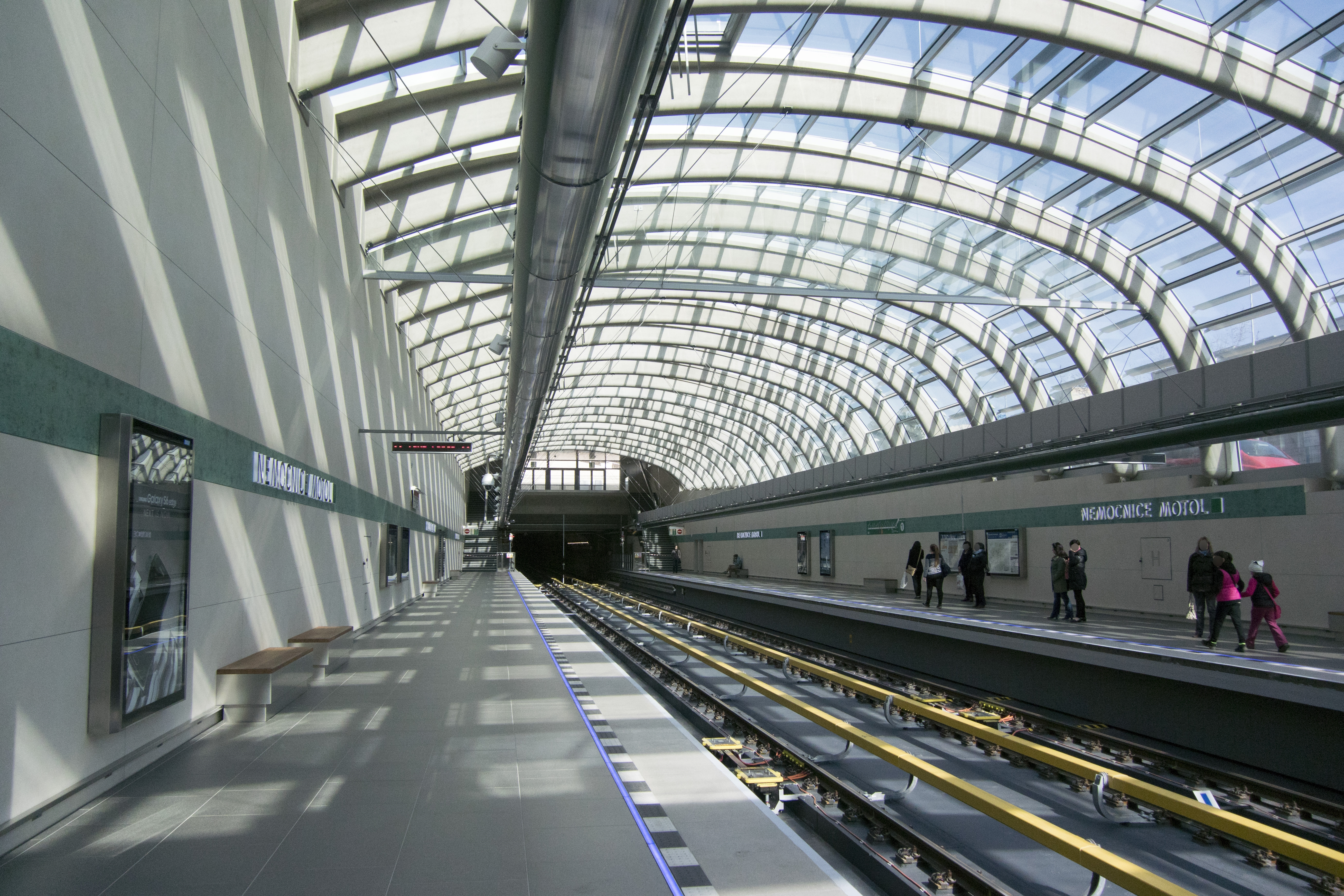 Metro trasy A - Nemocnice Motol - 9.4.2015